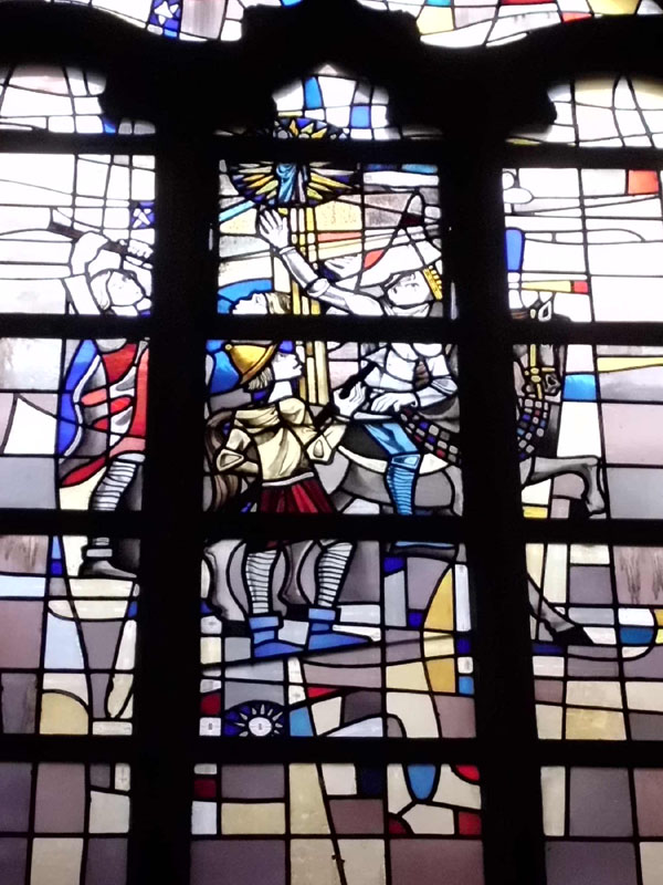 L'apparition de Notre Dame de Groeninghe au roi Sigis durant la bataille des éperons d'or. de Verschijning van Onze-Lieve-Vrouw van Groeninge aan Koning Silis tijdens de Guldensporenslag. The apparition of Our Lady of Groeninghe to King Sigis during the battle of the golden spurs. Vitrail de l'église Saint Michel de Courtrai, Belgique. Glaswerk van de Sint-Michielskerk te Kortrijk, België. Stained Glas of the Church Saint Michael, Kortrijk, Belgium.